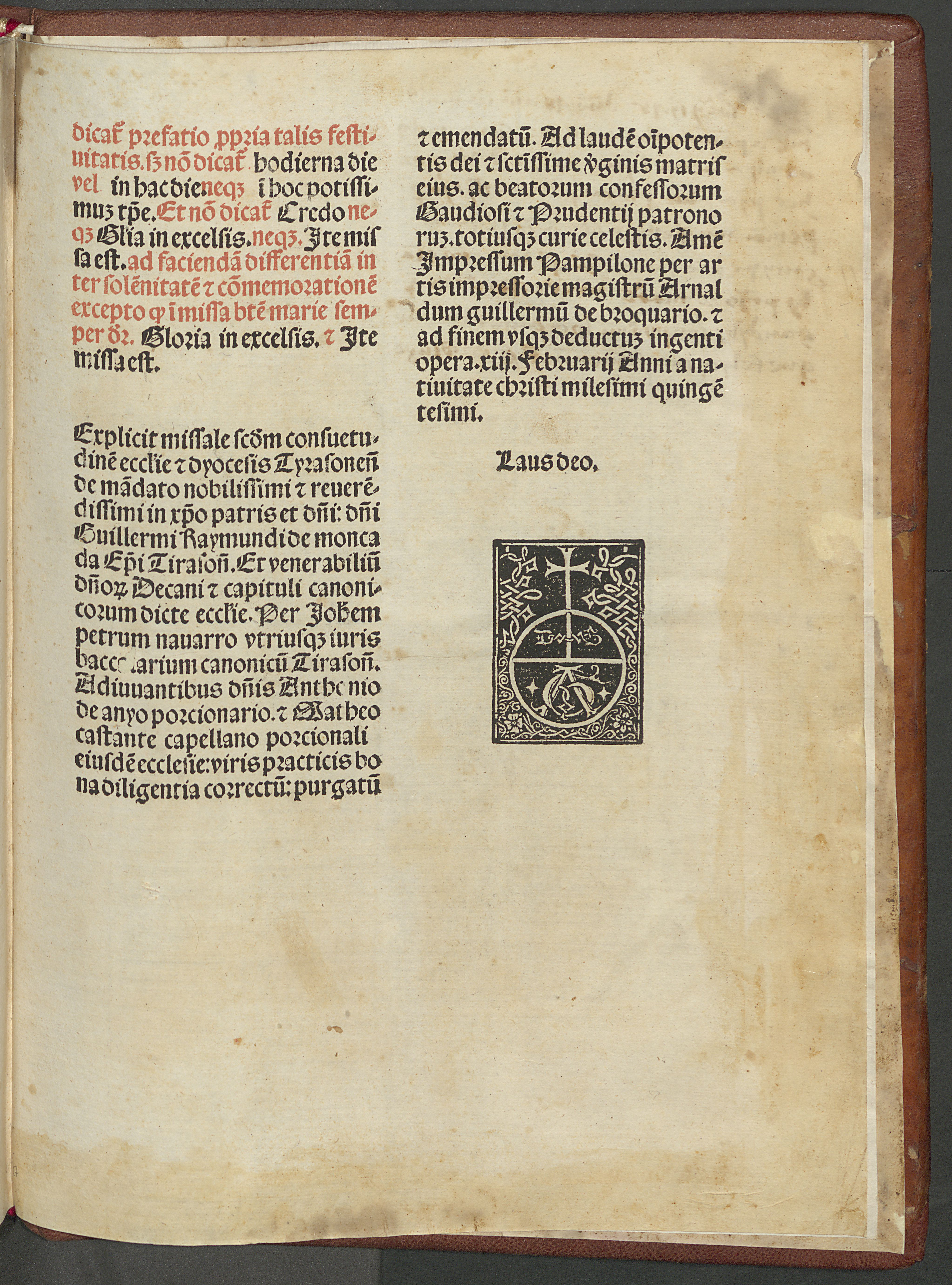 Brocar, Missale Tirasonensis, 1500. Pamplona. Tarazona diócesis